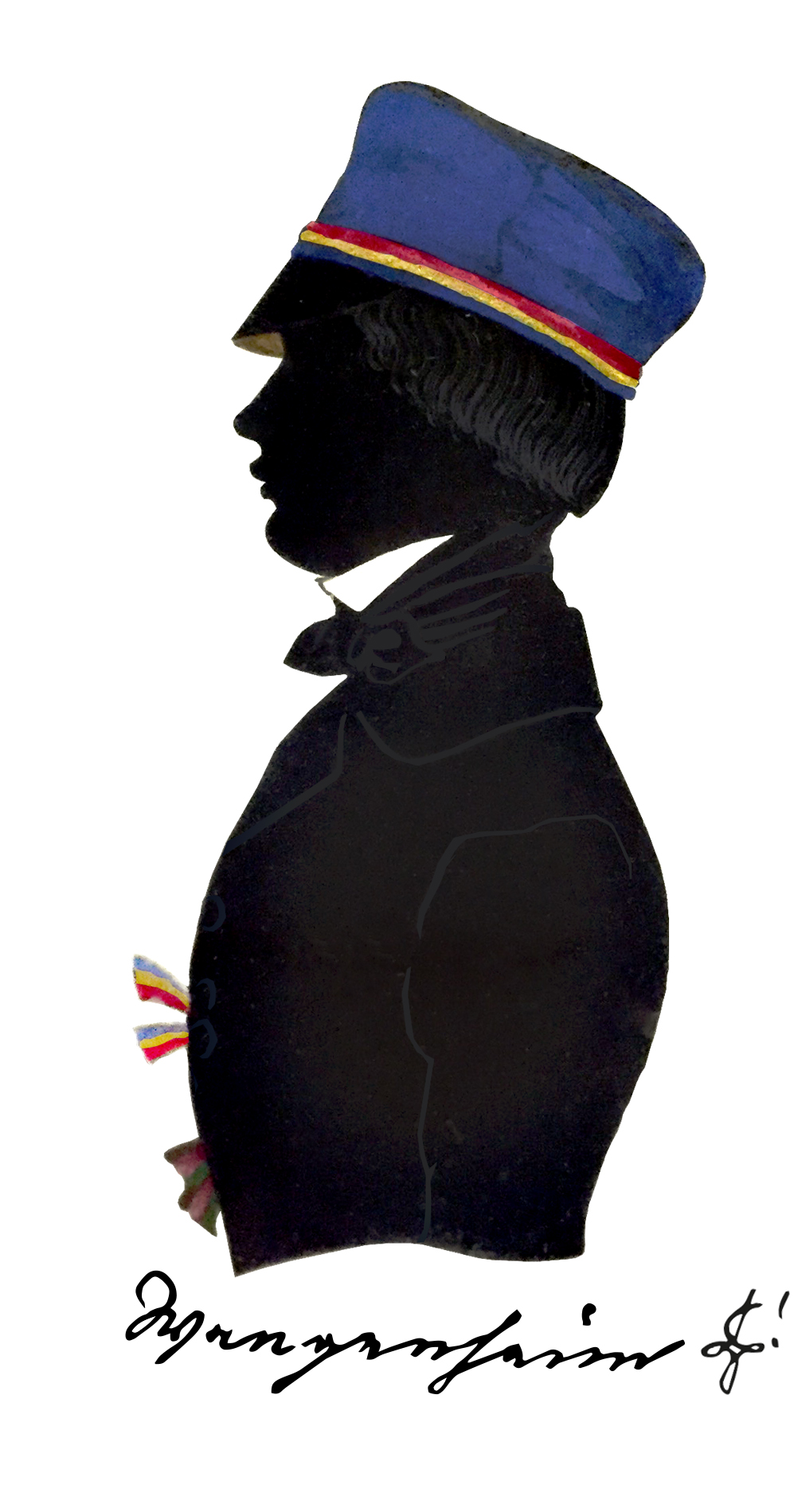 Signierter Schattenriss von Konstantin von Wangenheim.